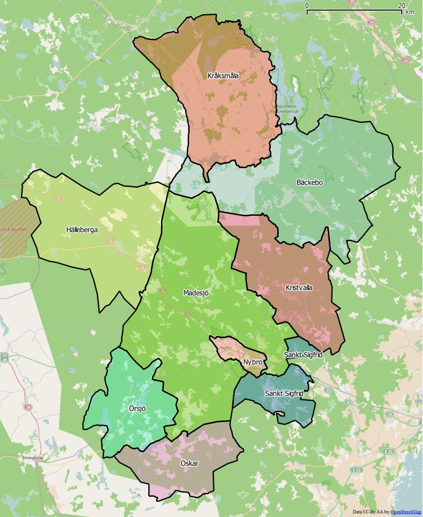 Distriktsindelningen i Nybro kommun World file: 106.48556981408168554 0 0 -106.48556981408168554 1723129.52179512358270586 7781370.87362359091639519